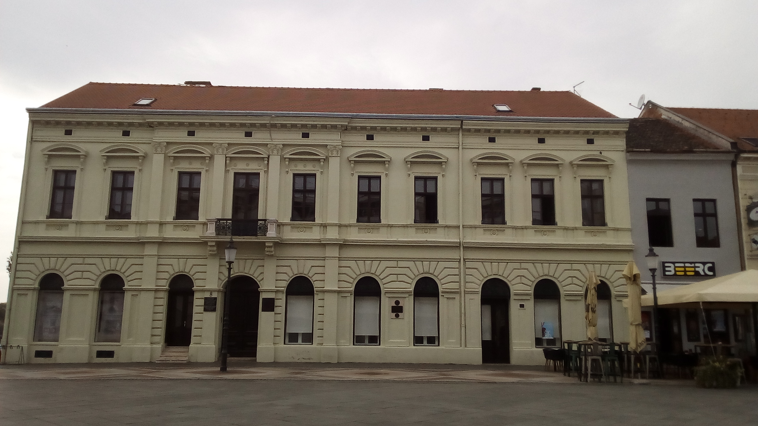 Zgrada obitelji Brlić, Trg I.B. Mažuranić 8